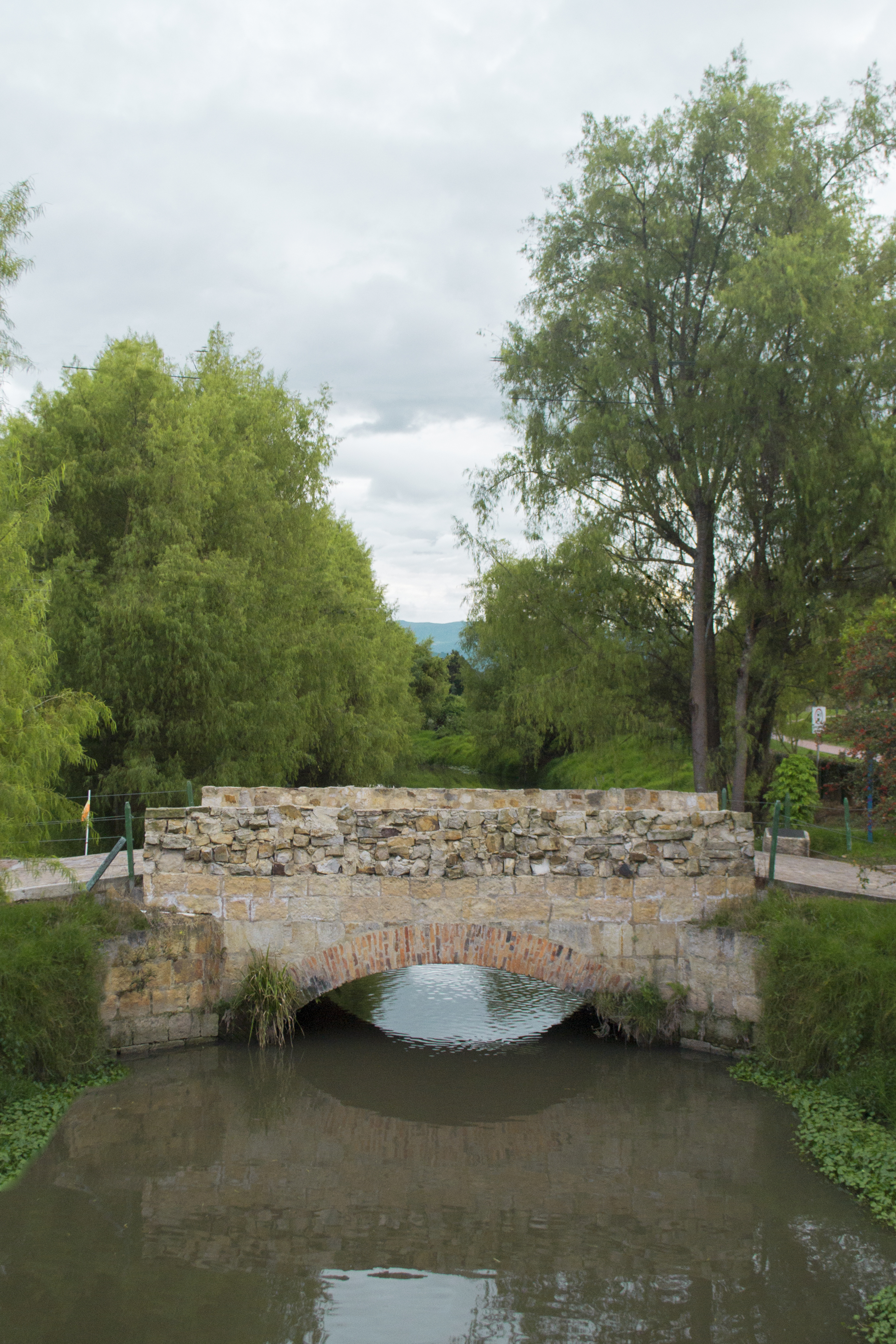 Replica del Puente de Sopó construido en 1695 Lugar de la batalla en 1876 entre Liberales del gobierno comandados por Alejo Morales, y las Guerrillas de Guasca comandadas por José Maria Herran, que no estaban de acuerdo con las reformas sociales, políticas, pero principalmente religiosas que se intentaban implementar por el gobierno liberal de turno.